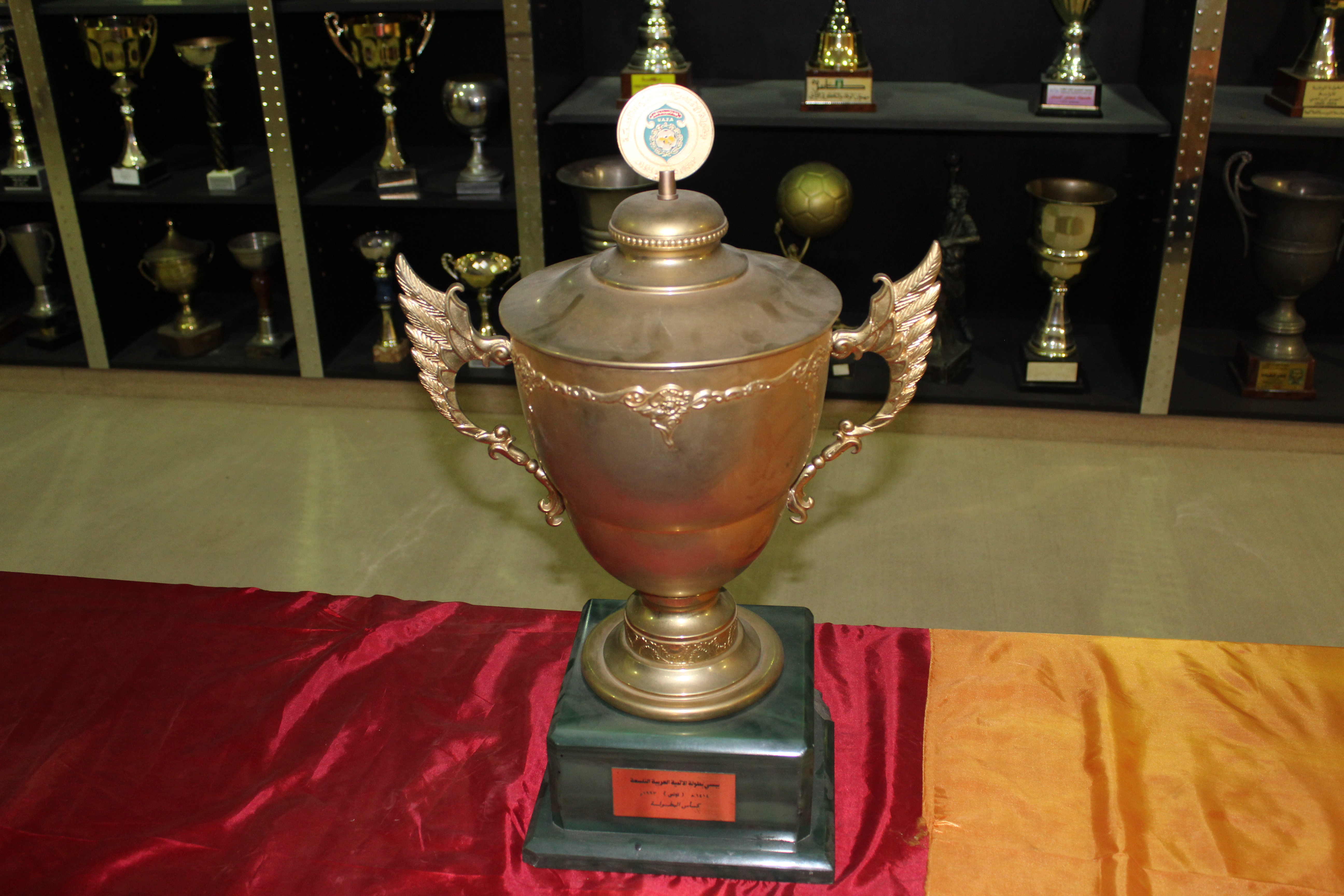 Bab Souika ,Tunis باب سويقة ، تونس